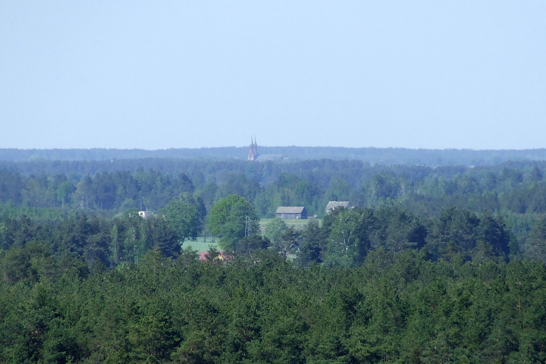 Kościół w Myszyńcu widziany z dostrzegalni przeciwpożarowej Wach-Podgórze (odległość ok. 12km)